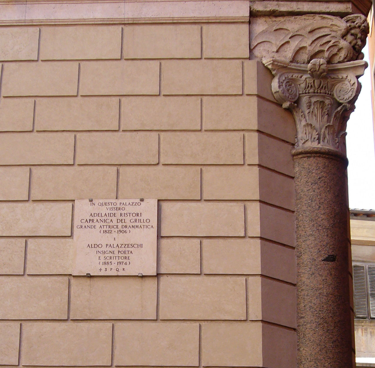 Roma, palazzo Capranica del Grillo ai Redentoristi, memoria di Ristori e Palazzeschi